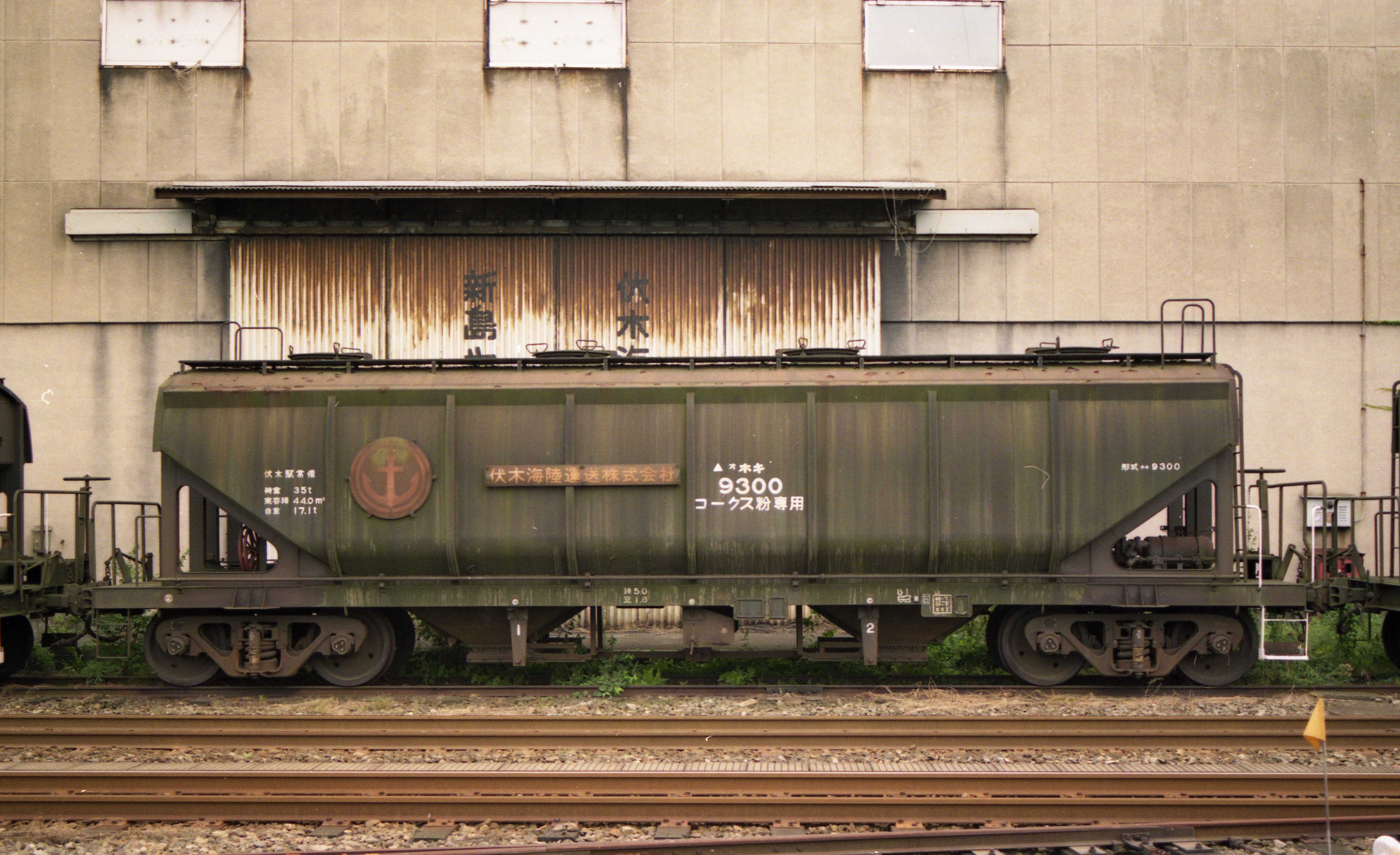 ホキ9300形ホキ9300、1992年9月19日 伏木駅